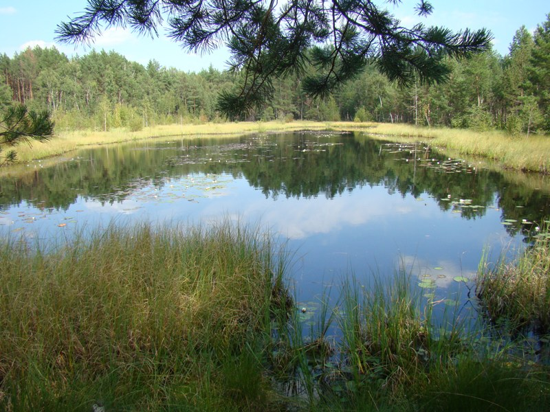 Окрестное озеро